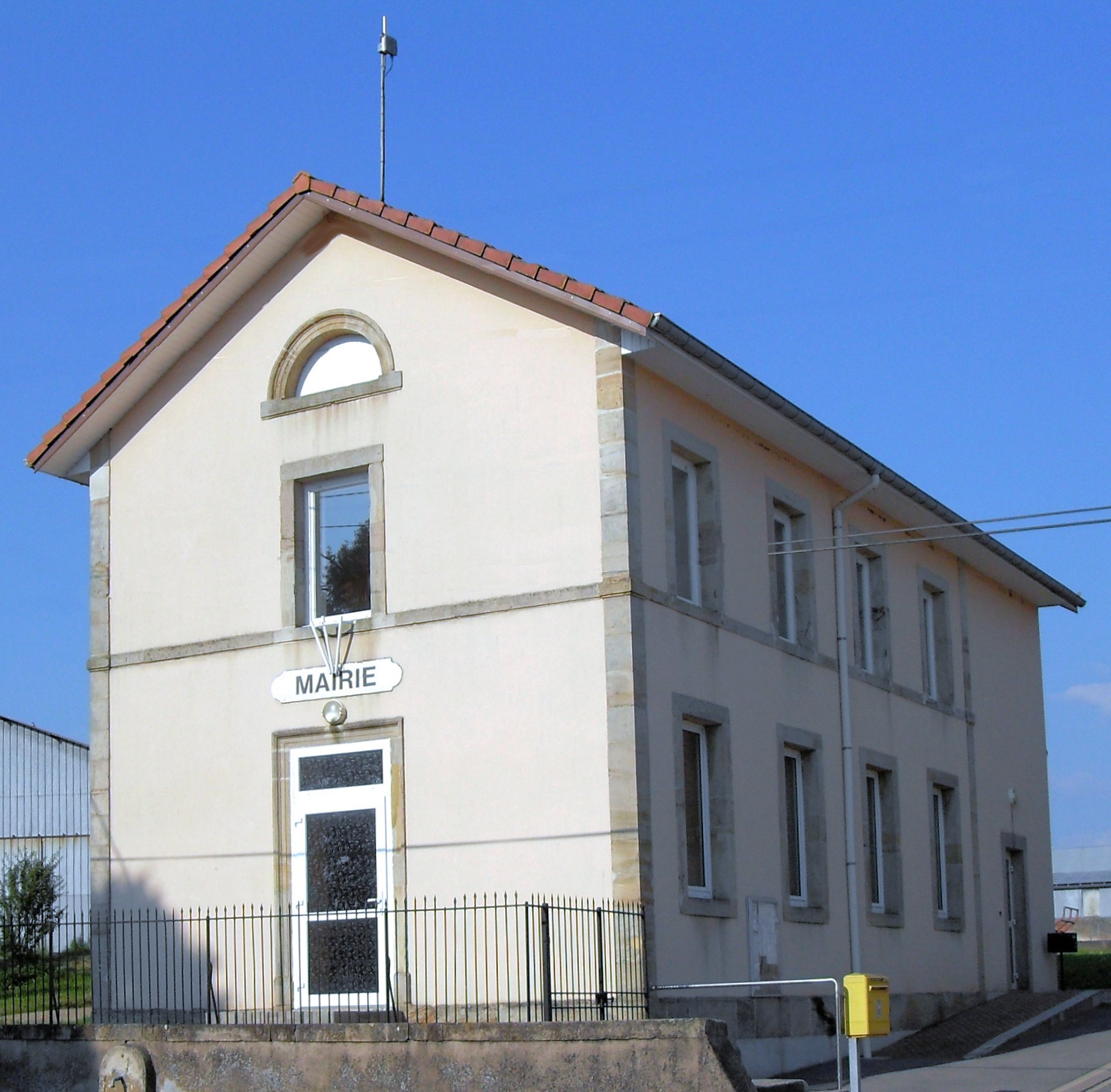 La mairie de Zincourt